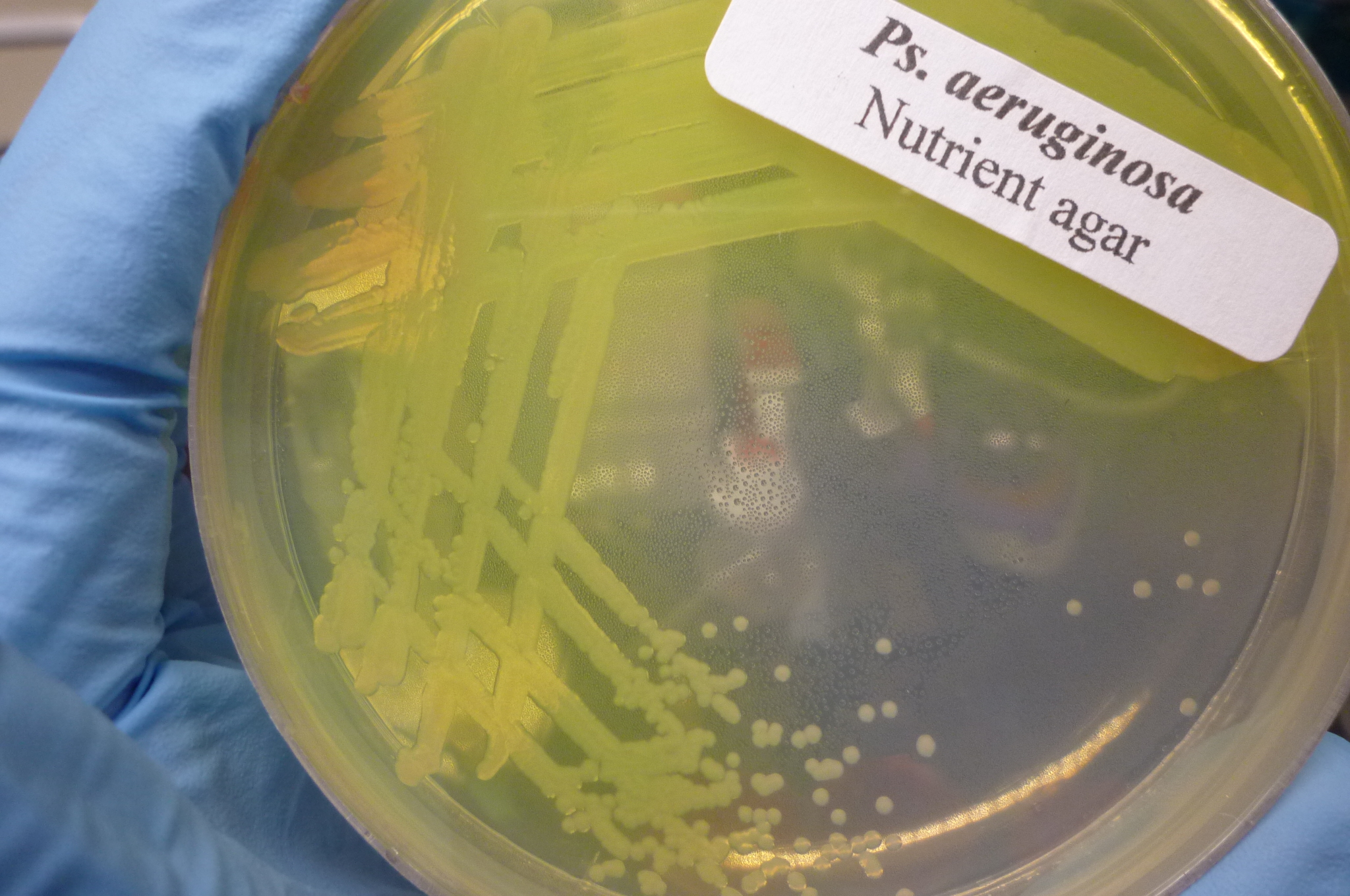 中文（香港）: Pseudomonas aeruginosa culture